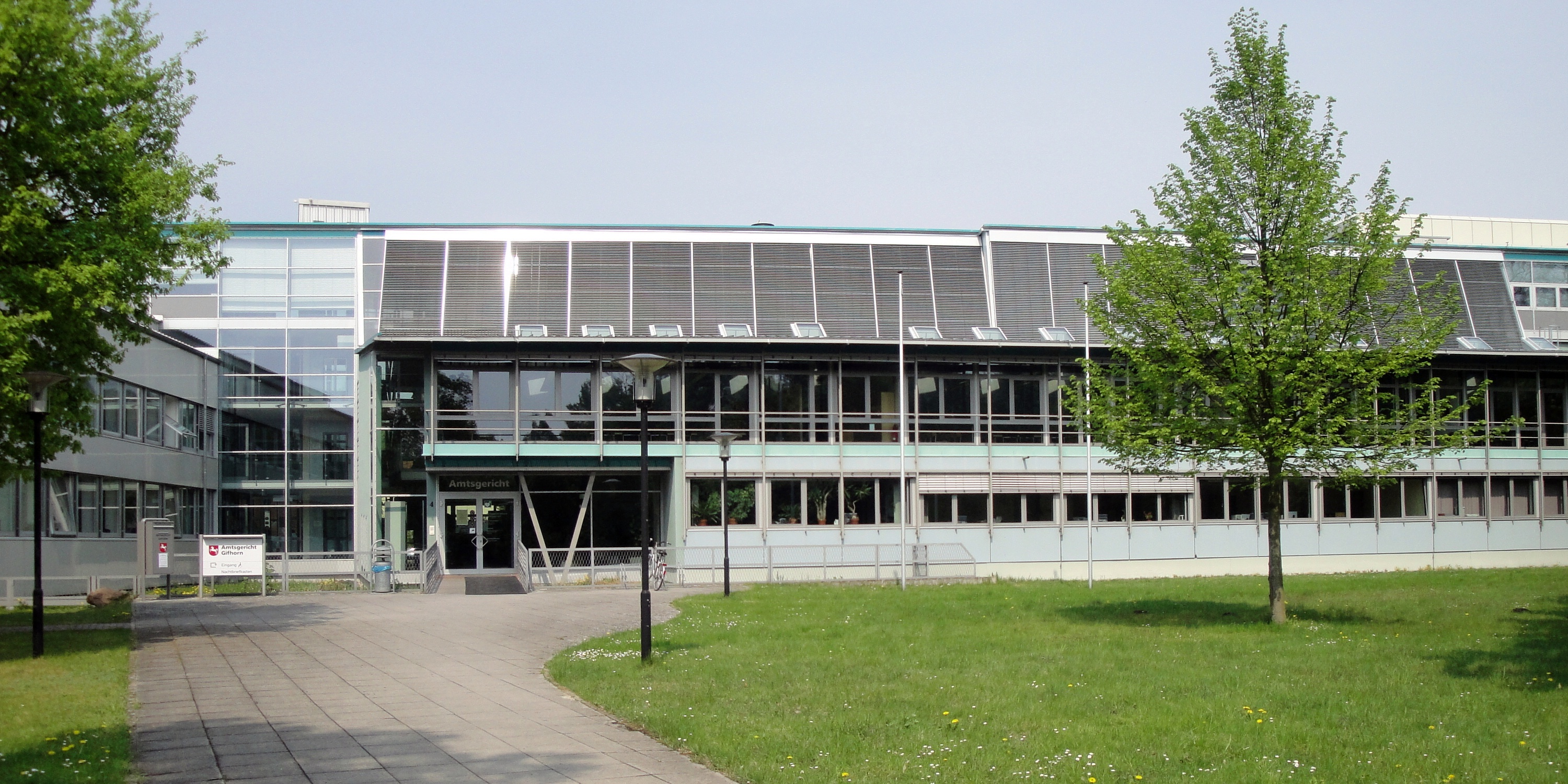 Amtsgericht Gifhorn, Eingang Konrad-Adenauer-Straße